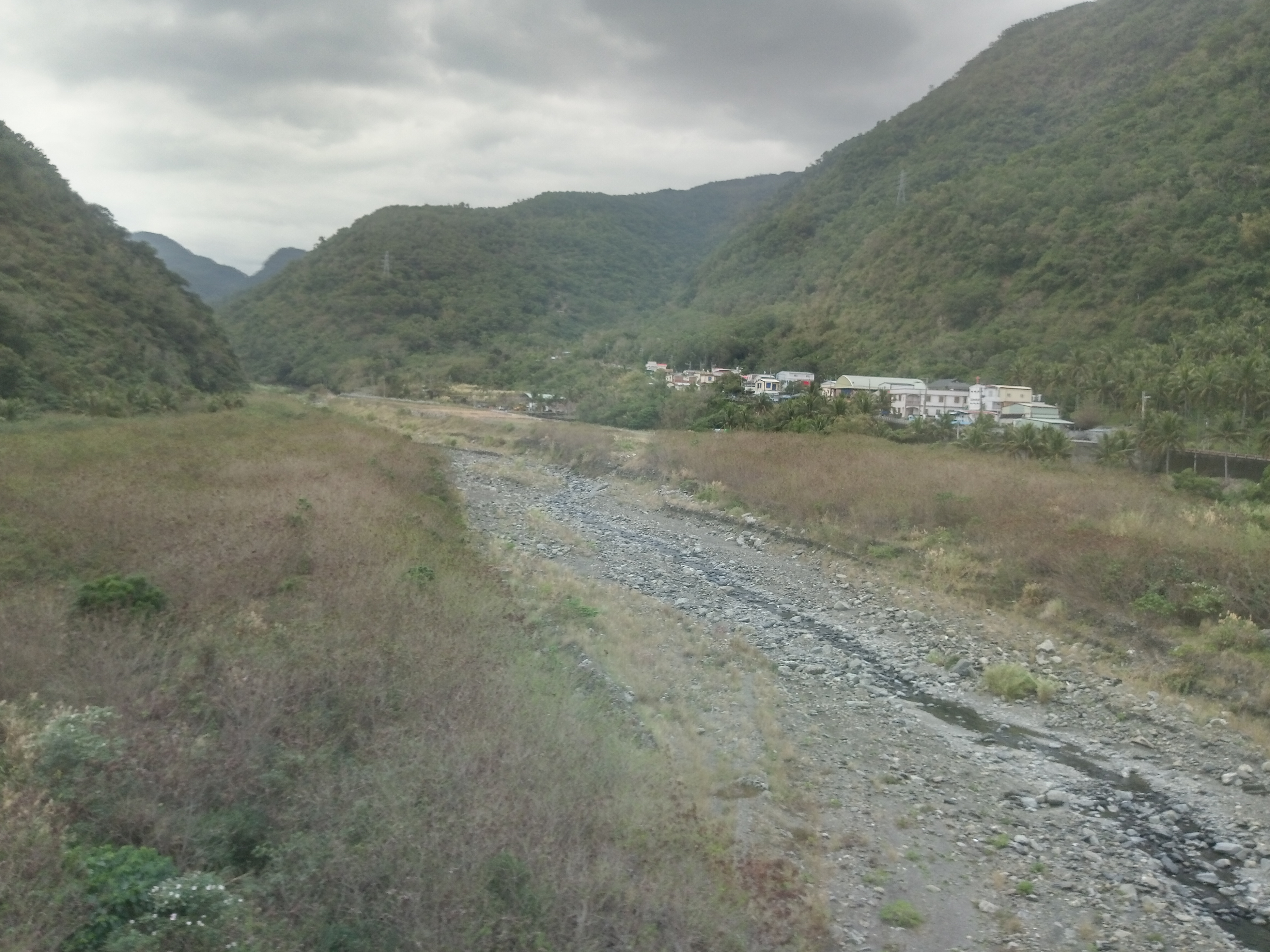 臺灣臺東縣津林溪